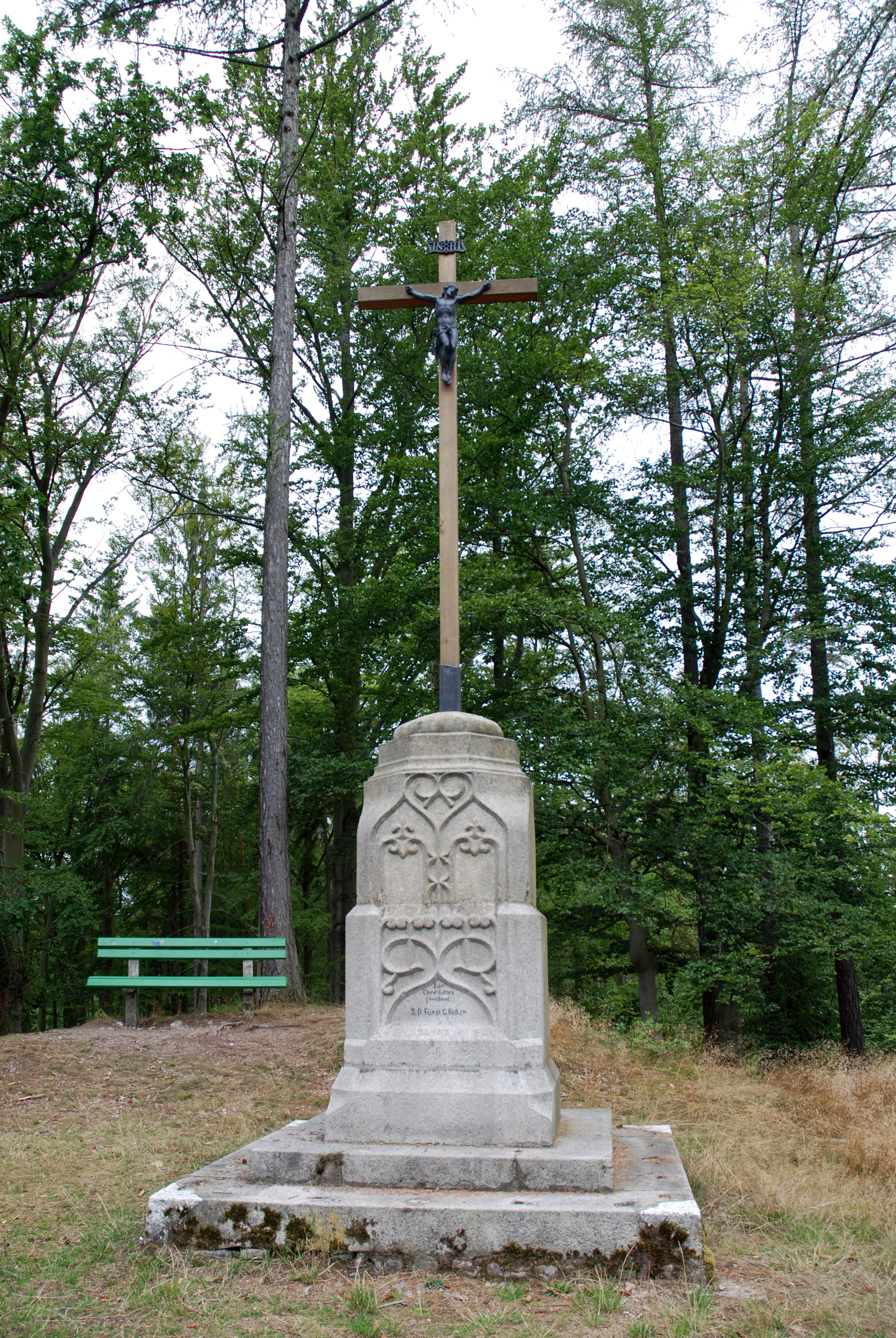 Rohanův kříž na vyhlídce na Sokolském vrchu v Karlových Varech